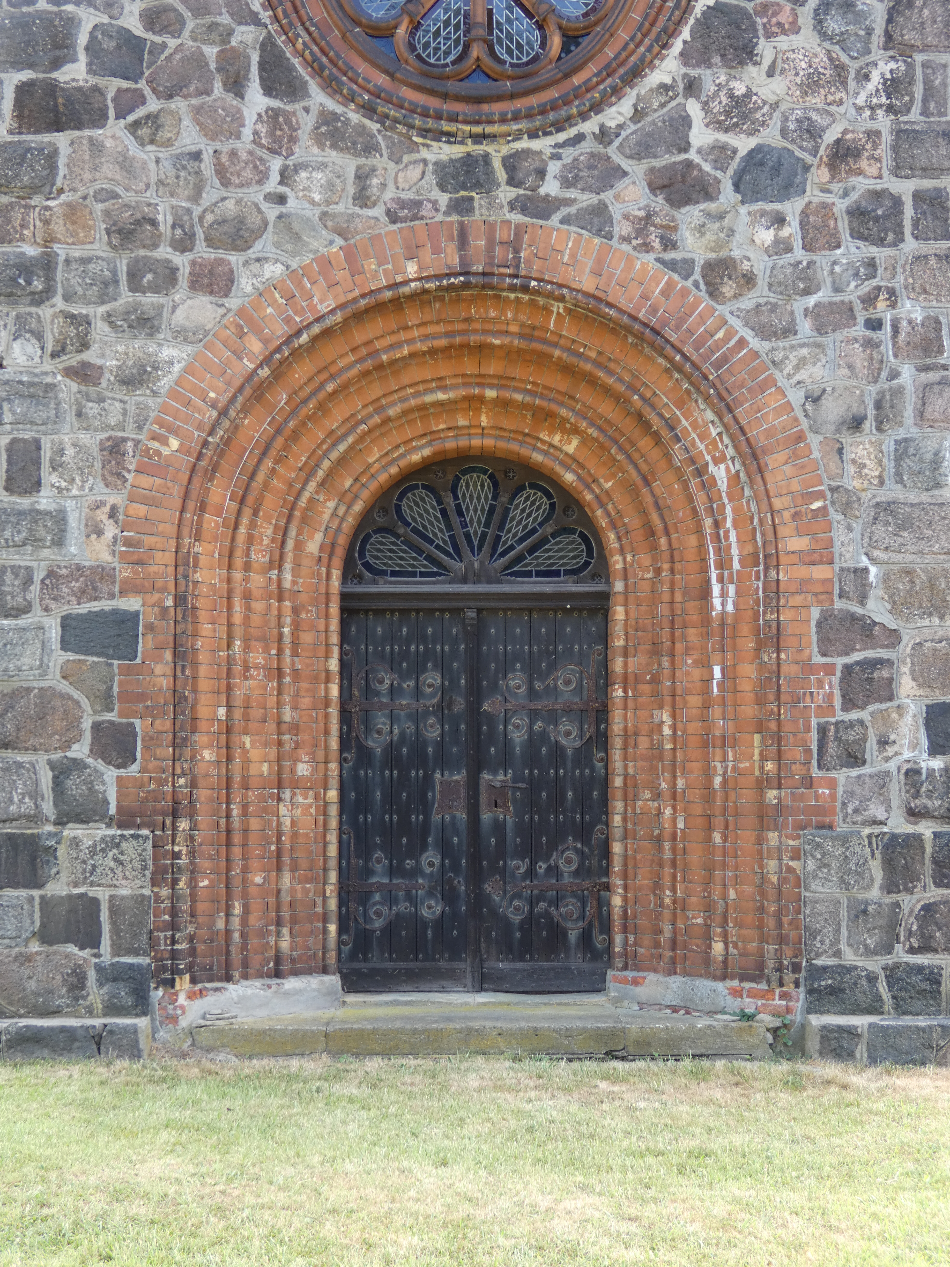 Stufenportal Wiesenburg